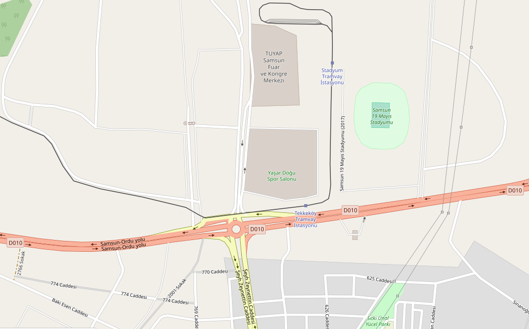 Samsun 19 Mayıs Stadyumu'nun konumuna dair standart OpenStreetMap haritası. This map of Samsun 19 Mayıs Stadyumu was created from OpenStreetMap project data, collected by the community. This map may be incomplete, and may contain errors. Don't rely solely on it for navigation.